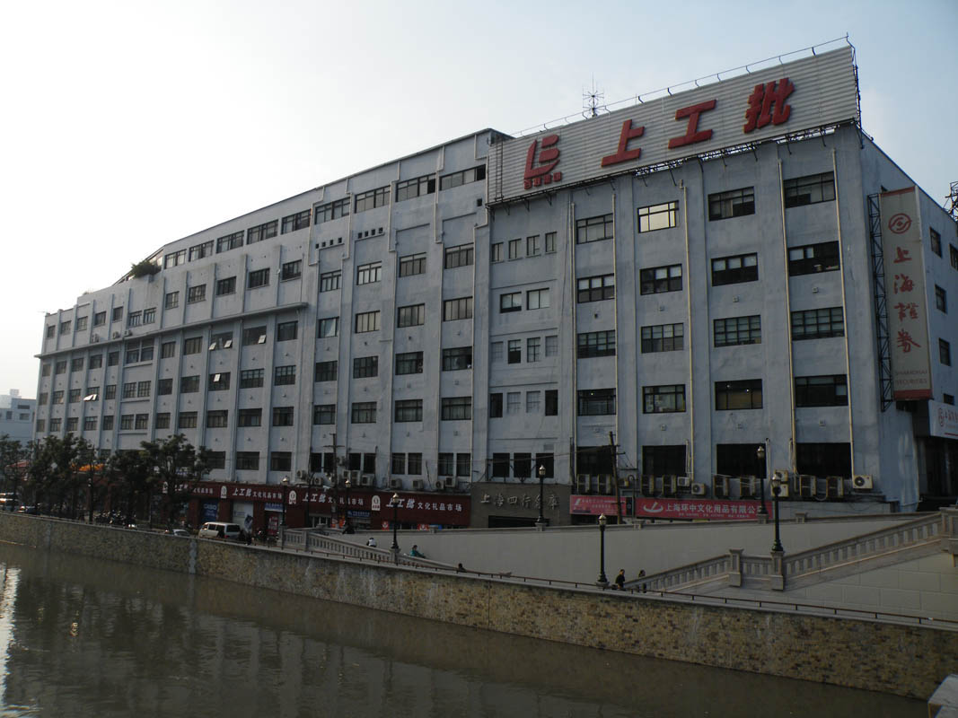 Sihang Warehouse, Shanghai